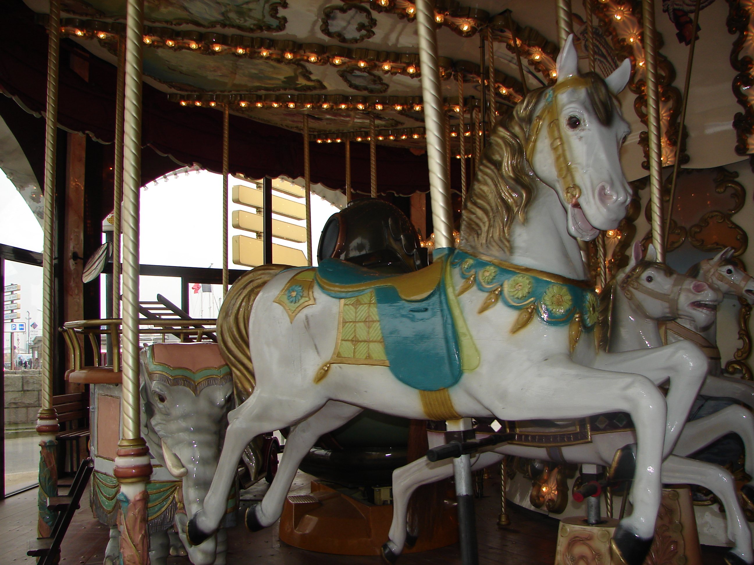 Lieu : Saint Malo (Bretagne / France) Manège à l'entrée de la vieille ville